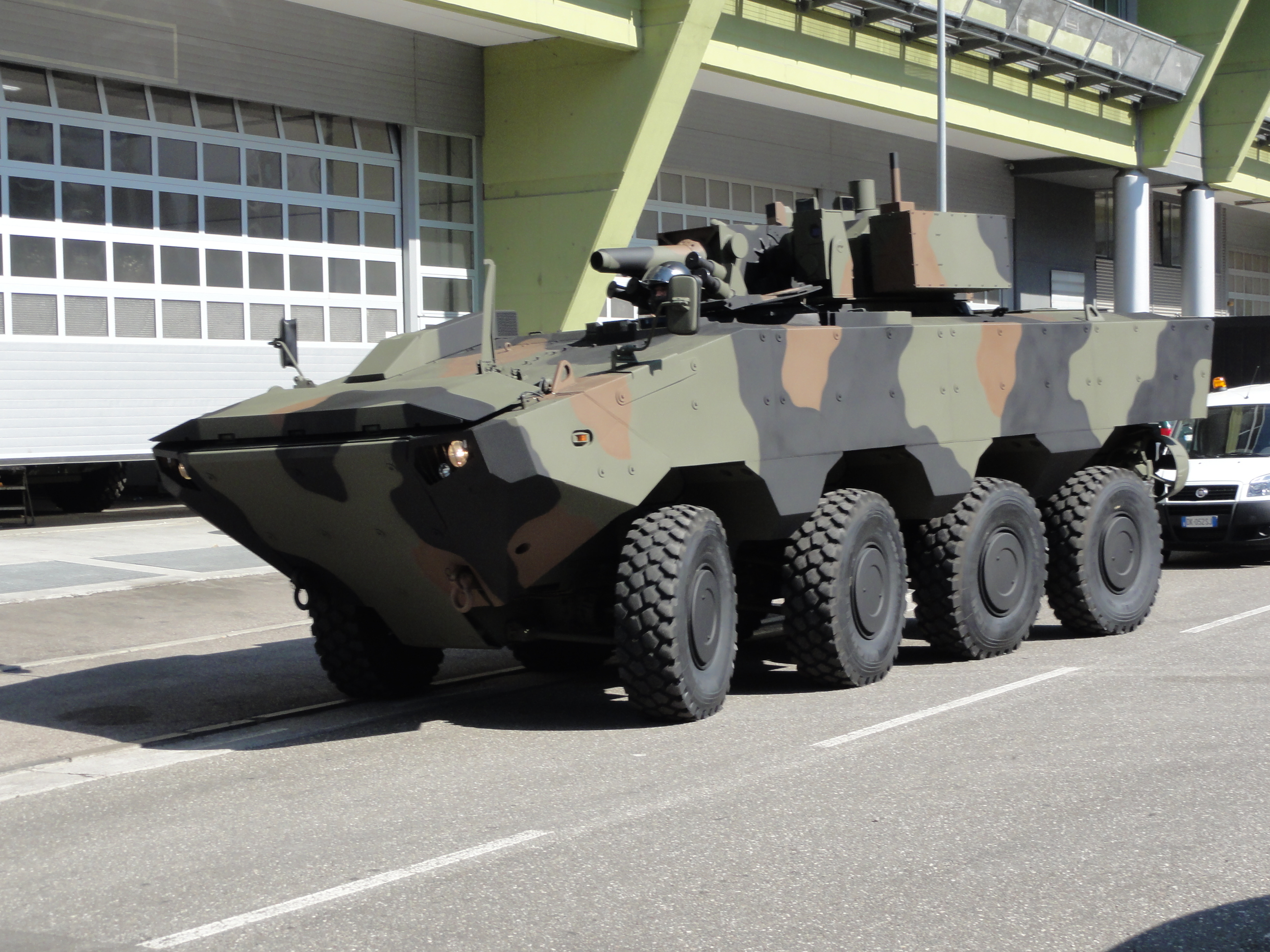 Bozen-Bolzano — SUPERAV